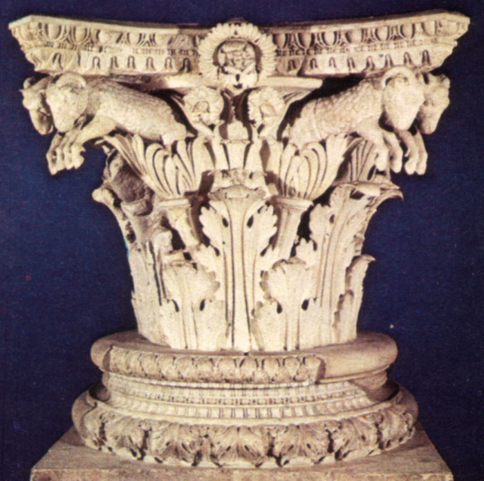 Descrizione: vedi titolo Fonte: Filippo Coarelli, Guida archeologica di Roma, Arnoldo Mondadori Editore, Verona 1984. Categoria:Immagini d'arte romana